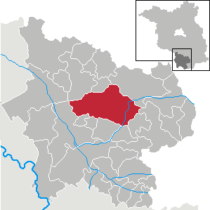 Doberlug-Kirchhain in Brandenburg (Country) - District Elbe-Elster